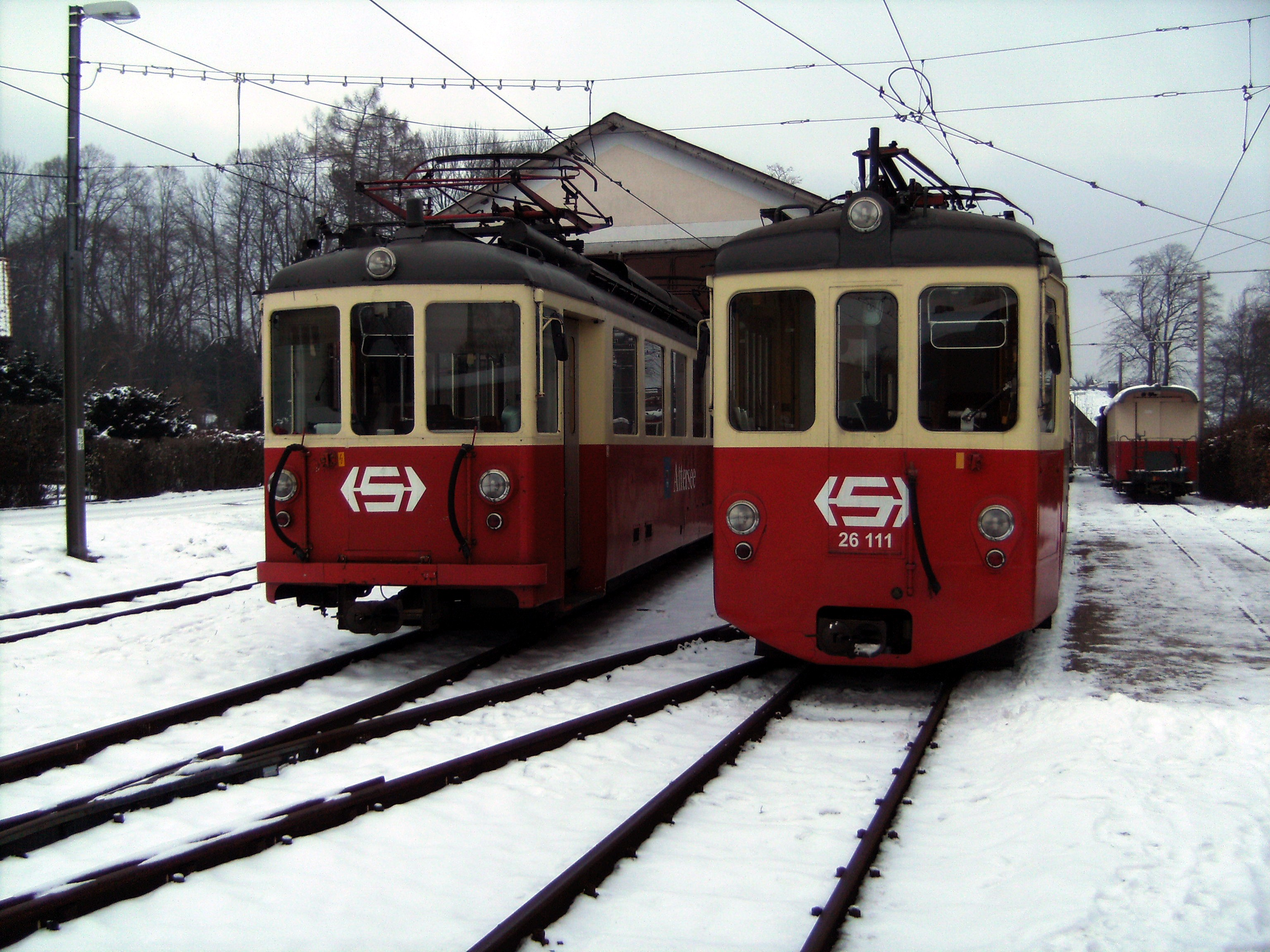 2 Triebwagen (ex AOMC/SeTB, 1949 und ex BLT/BTB, 1951) vor der Remise in Attersee. Dabei ist bemerkenswert, dass die Triebwagen bei der AOMC ebenfalls durch solche ex BLT/BTB abgelöst wurden, diese waren jedoch Baujahr 1966